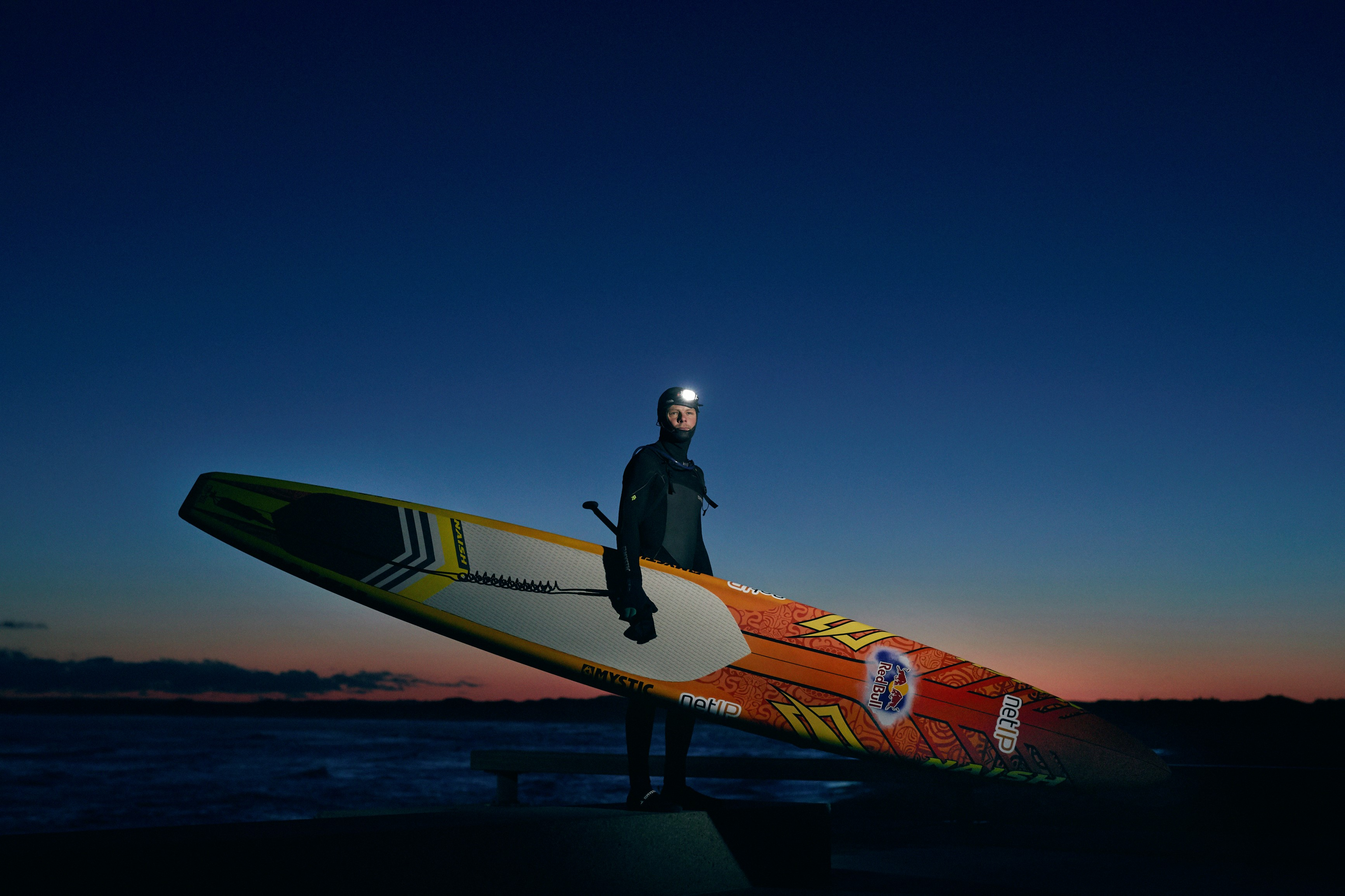 Casper Steinfath krydsede som den første i verden Skagerrak på et surfbræt søndag 18. marts 2018: Foto: Fredrik Clement